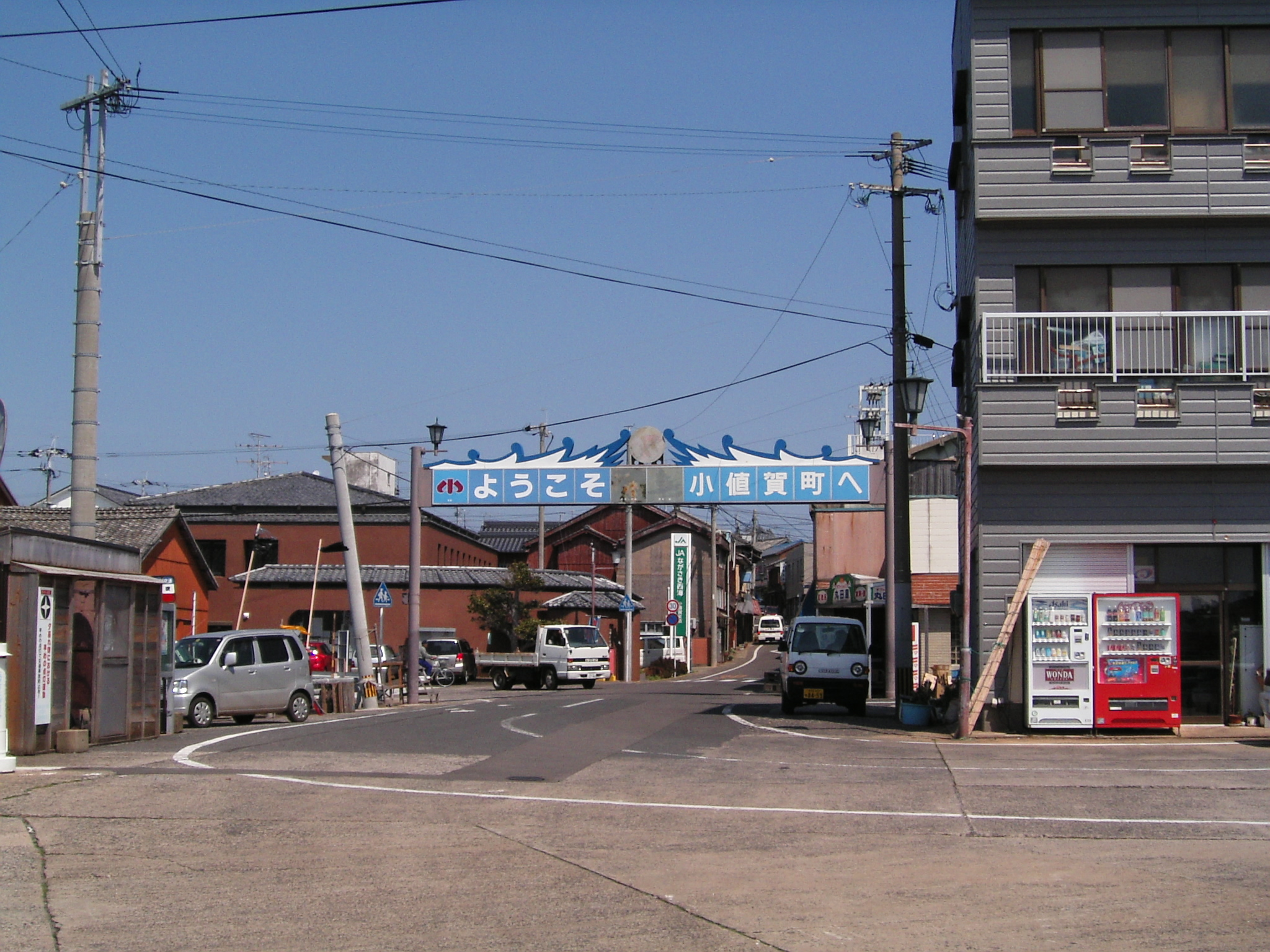 小値賀笛吹港付近 撮影者：利用者:Ritsuka 撮影日：2005-03-29 撮影場所：長崎県北松浦郡小値賀町笛吹郷